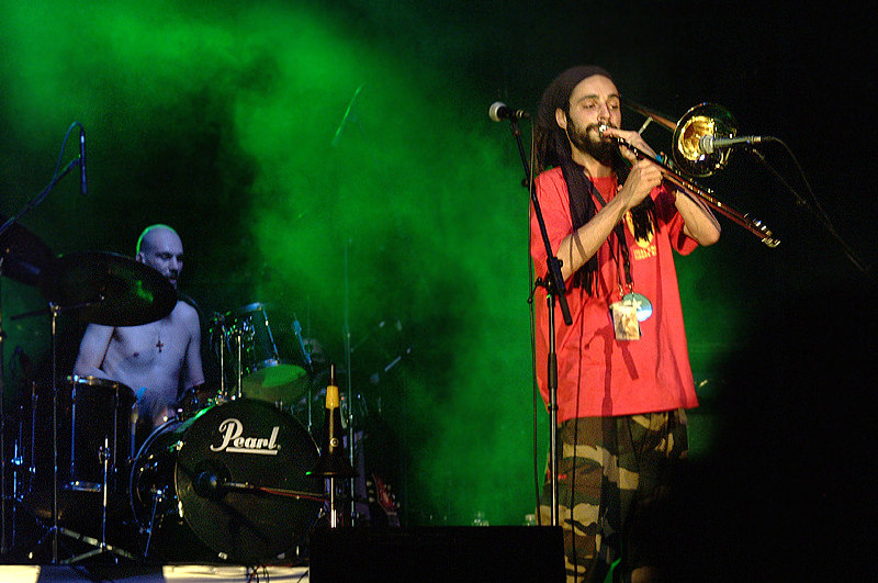 Слика бенда EYESBURN са наступа на Новосадском фестивалу EXIT